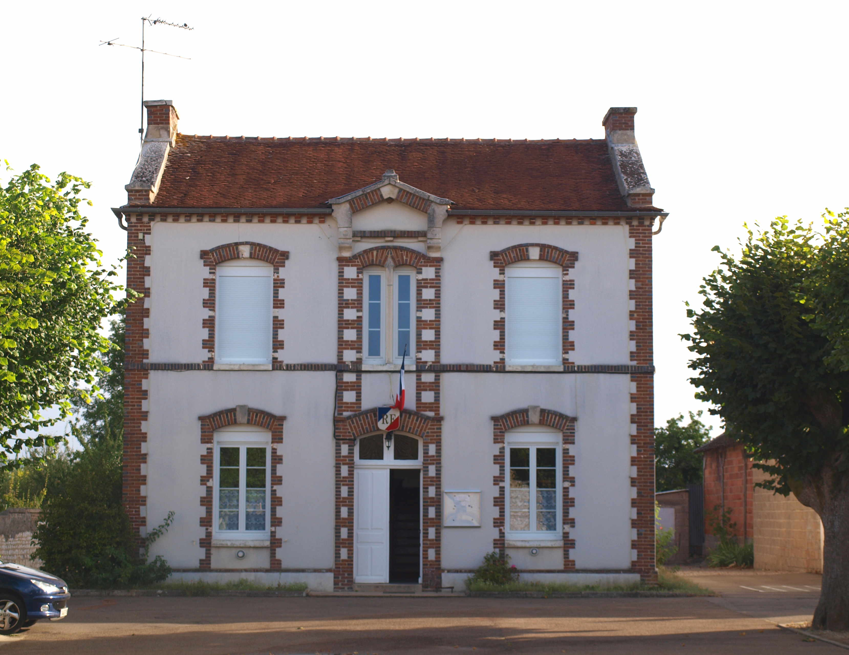 Paroy-sur-Tholon (Yonne, France) ; la mairie-01